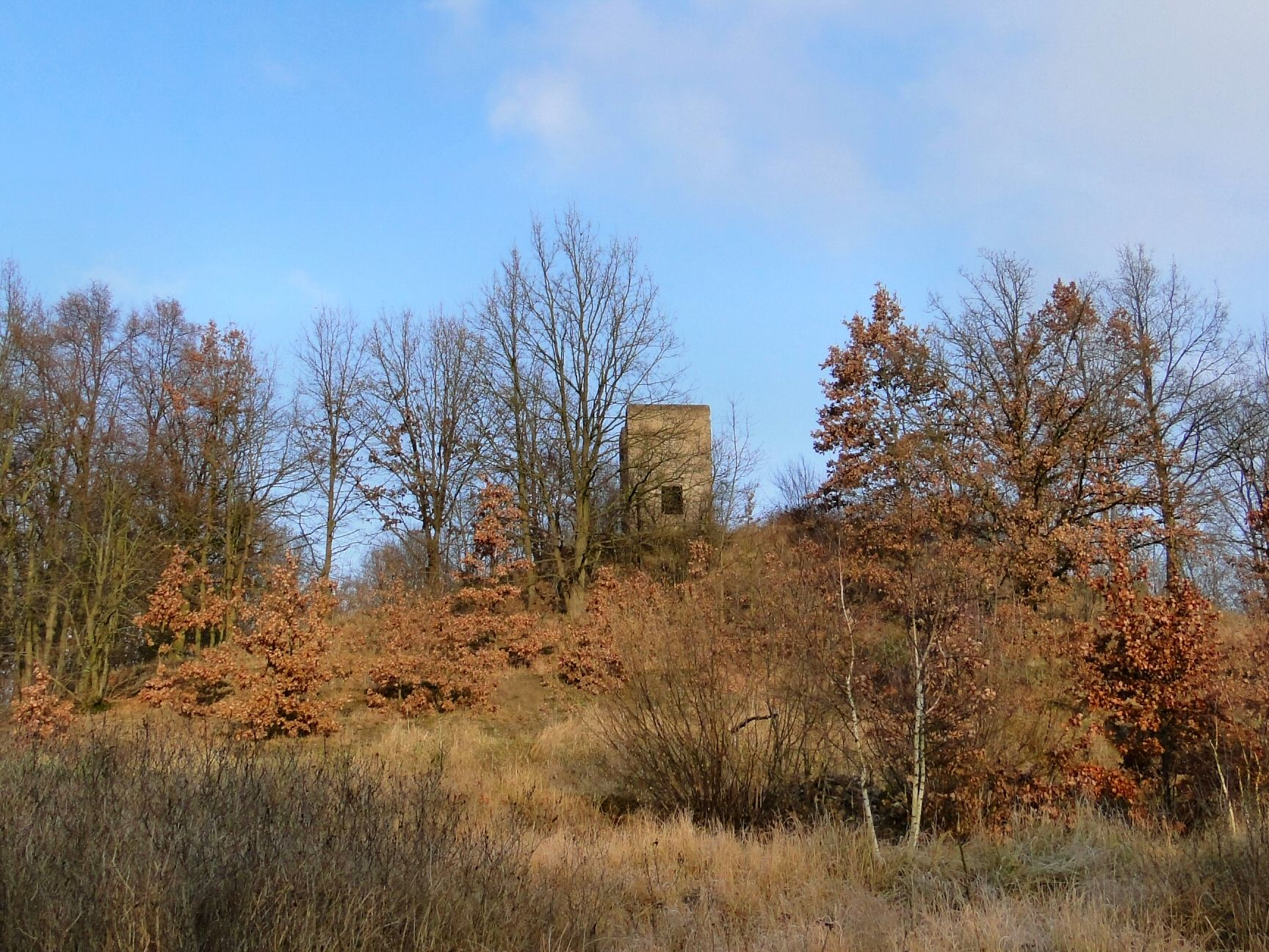 Szczecin Kluczewko - tzw. Wieża Batowa przy ul. Polarnej